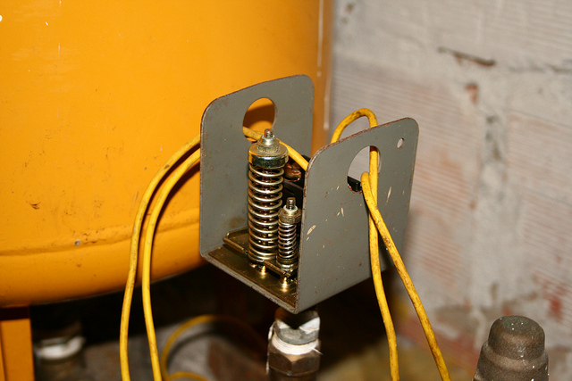 Pressostato